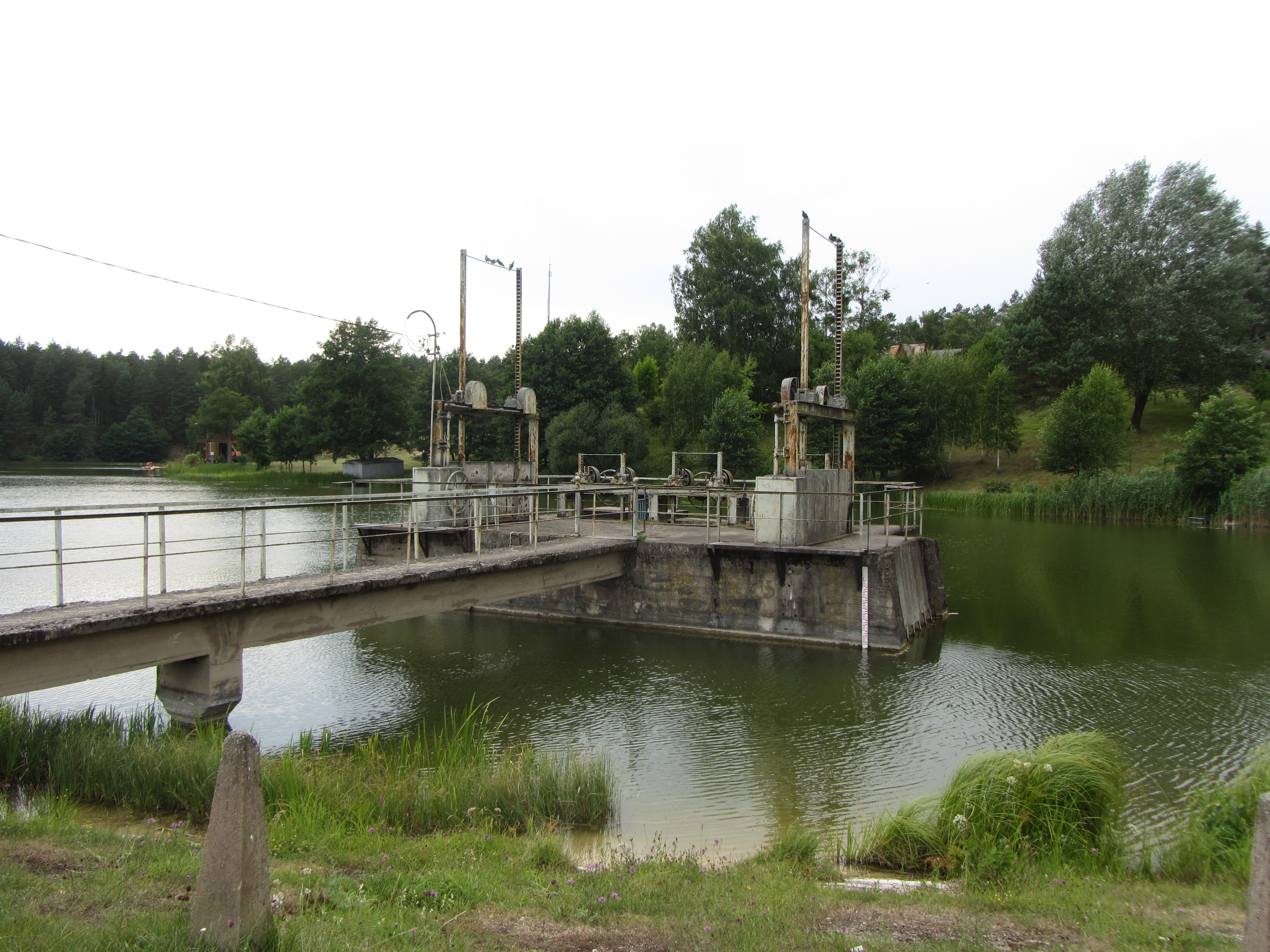 Leipalingio sen., Lithuania